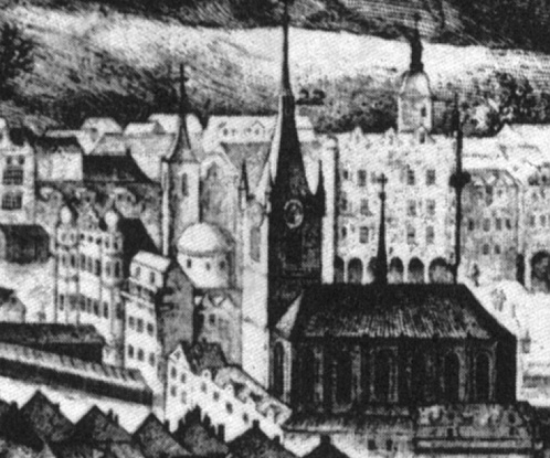 Gotický kostel Svatého Mikuláše a románská rotunda svatého Václava na Malé Straně, výřez z veduty Prahy od Filipa van den Boosche, vydaného Jiljím Sadelerem roku 1606